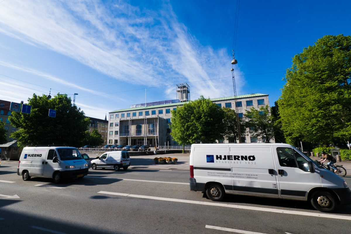 Hjernø A/S VVS-biler foran Aarhus Rådhus